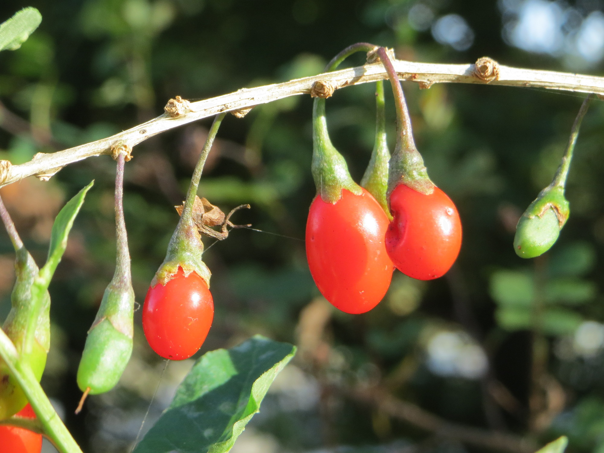 Gemeiner Bocksdorn (Lycium barbarum) im Schwetzinger Hardt